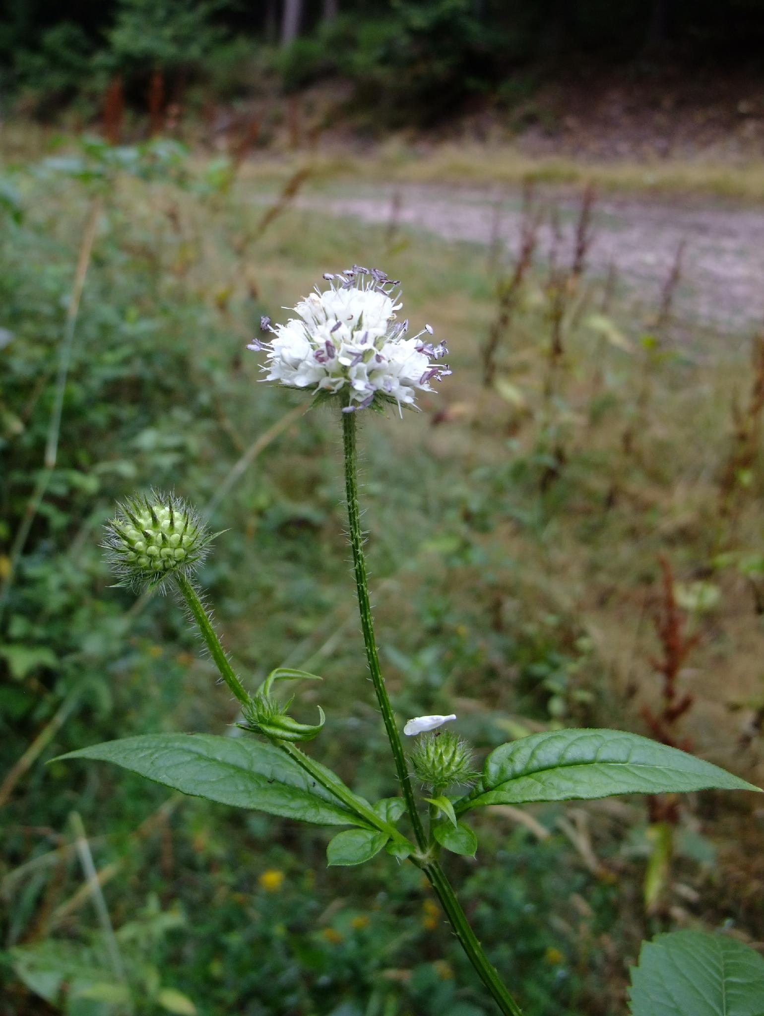 Dipsacus pilosus